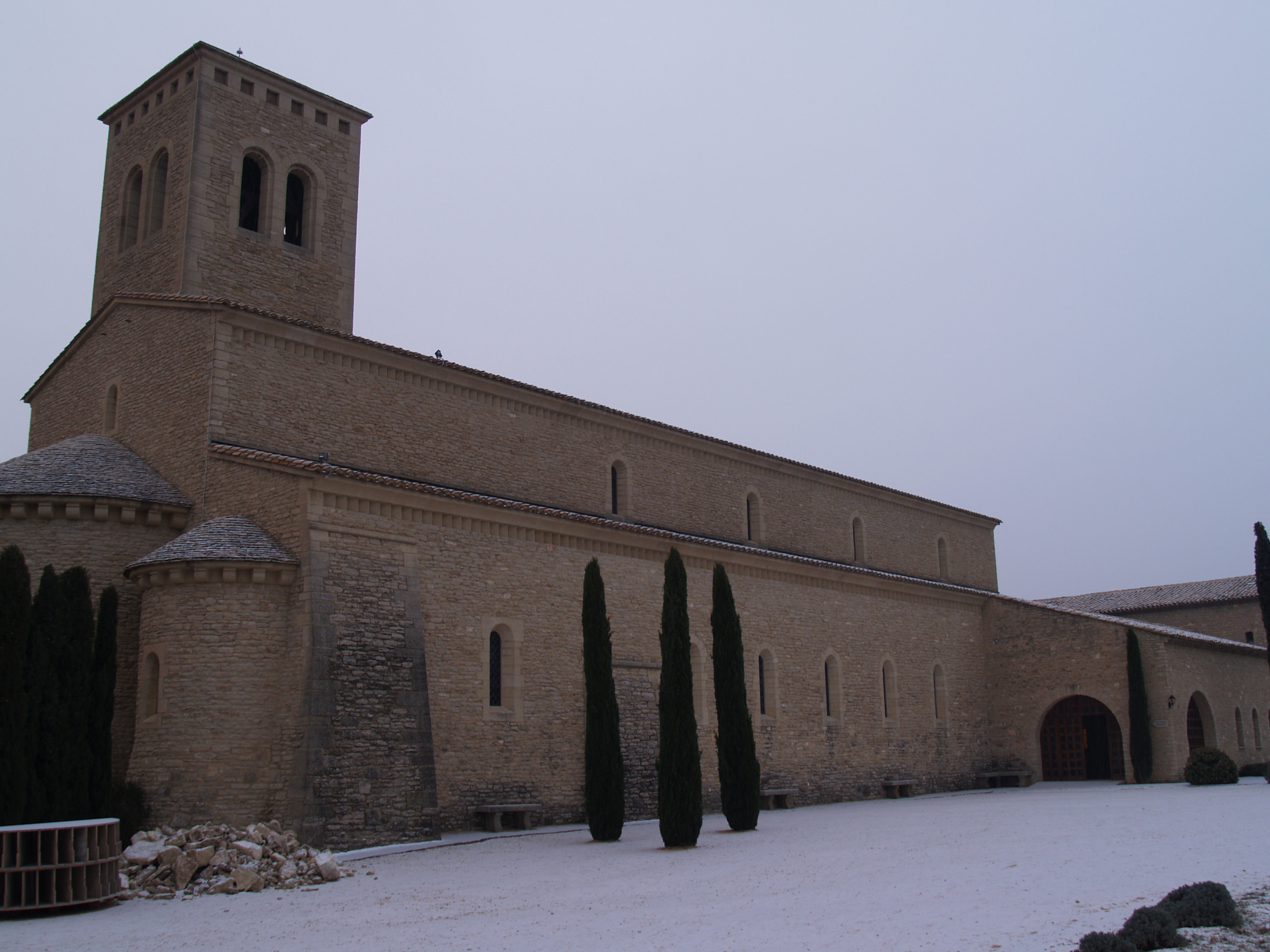 pris par moi même en décembre 2005 Bigor